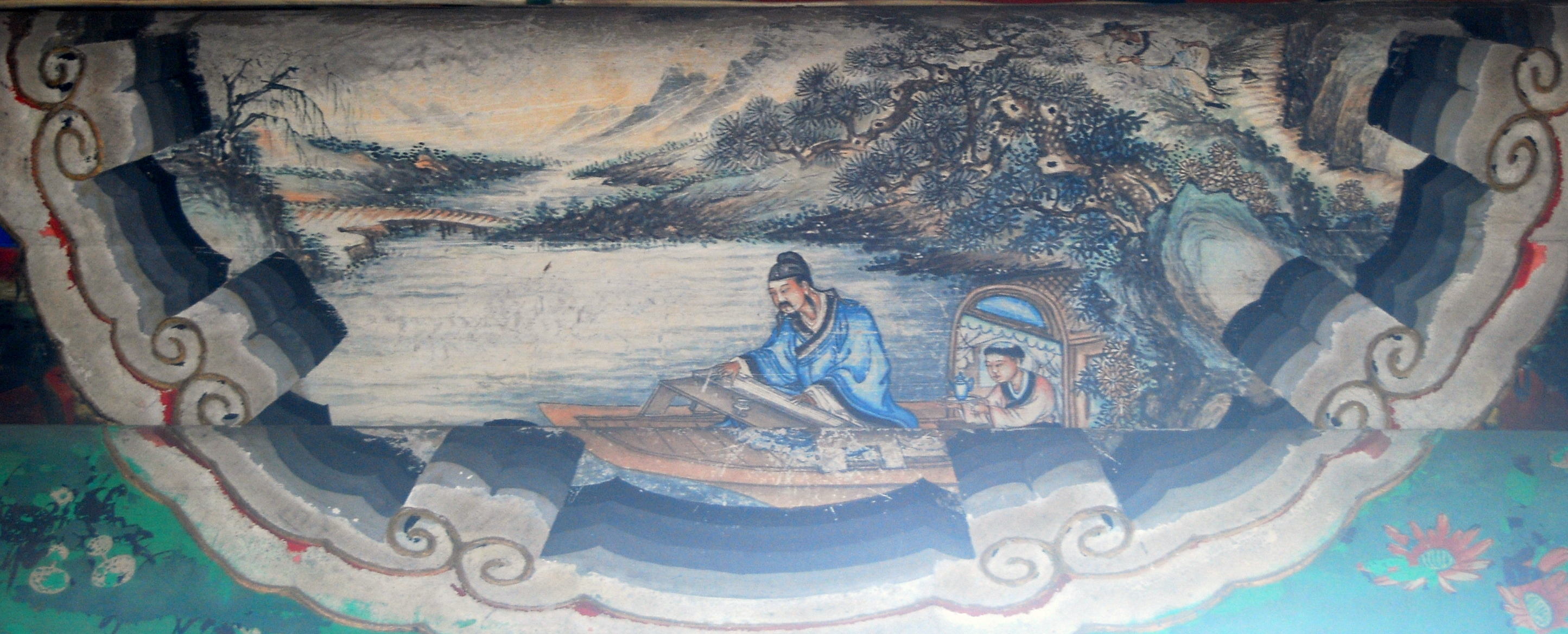 颐和园长廊上的彩绘：子期听琴，图中人为伯牙